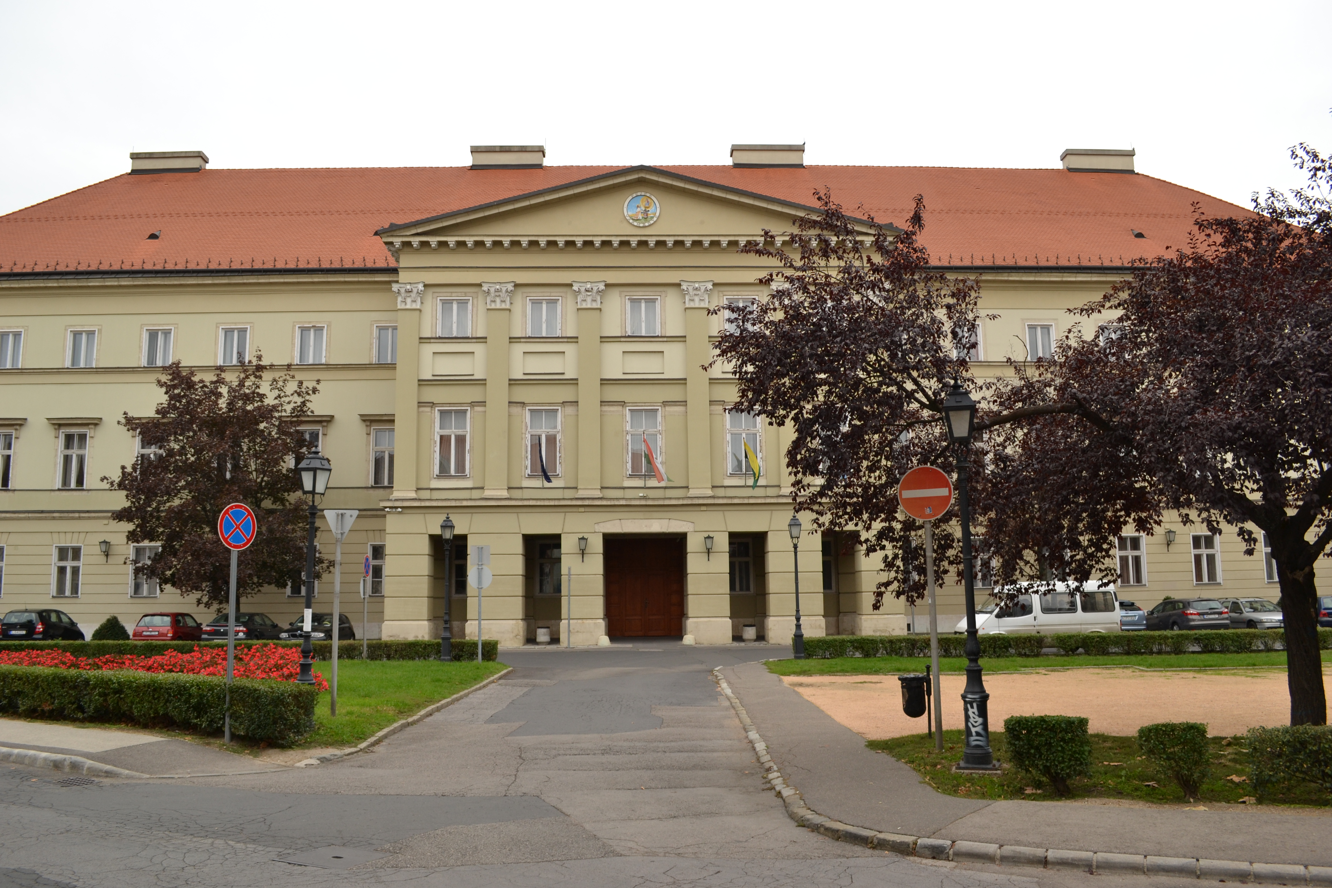 megyeháza This is a photo of a monument in Hungary. Identifier: 3901